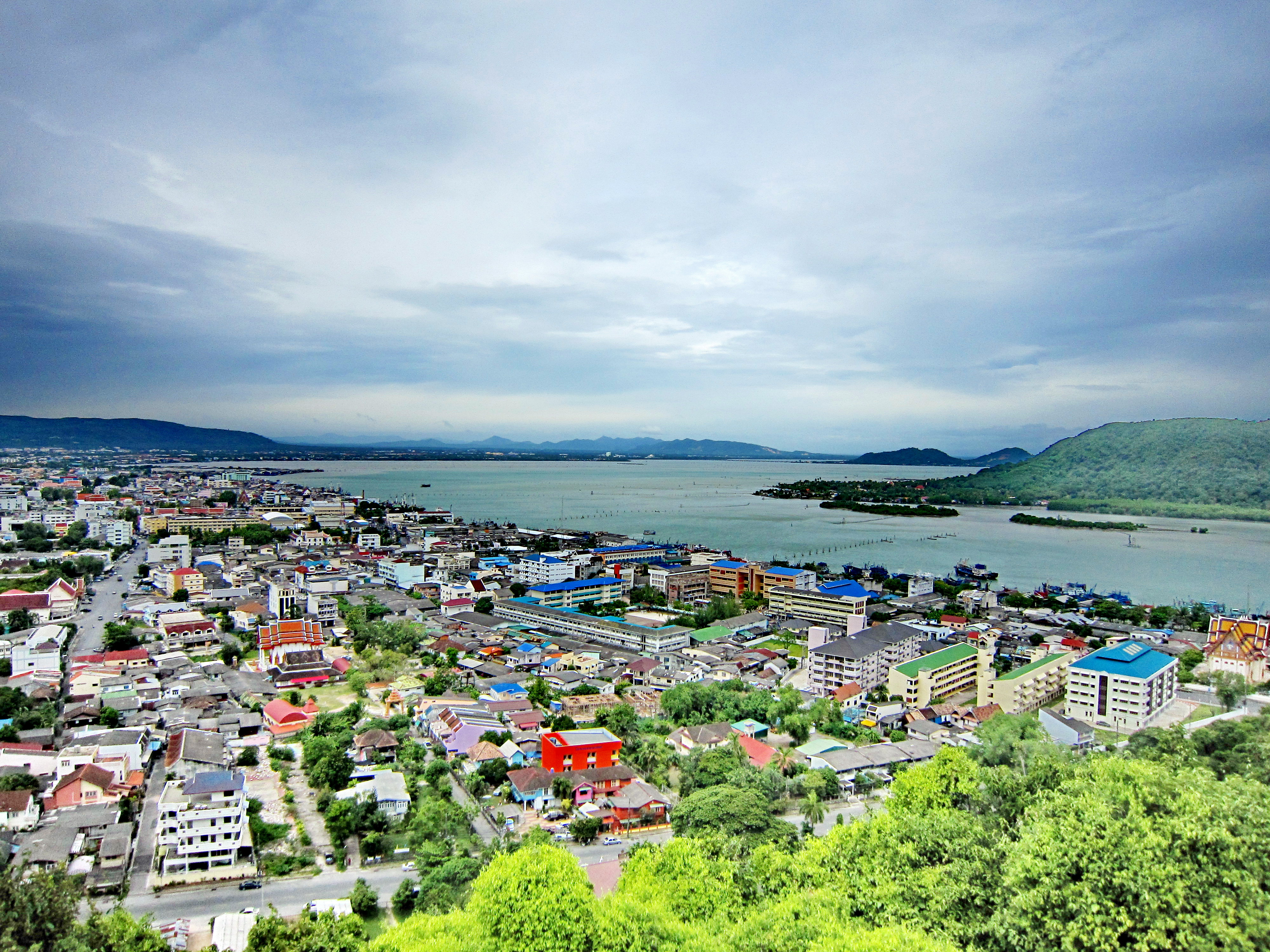 ยอดเขาตังกวน